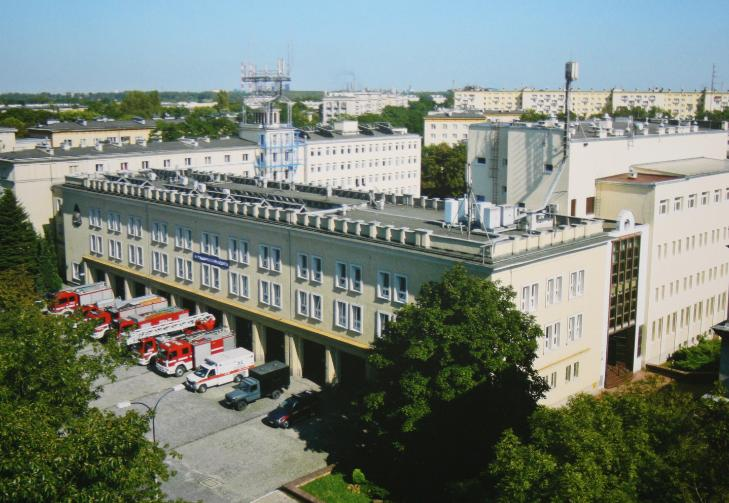 Siedziba Szkoły Aspirantów Państwowej Straży Pożarnej w Krakowie